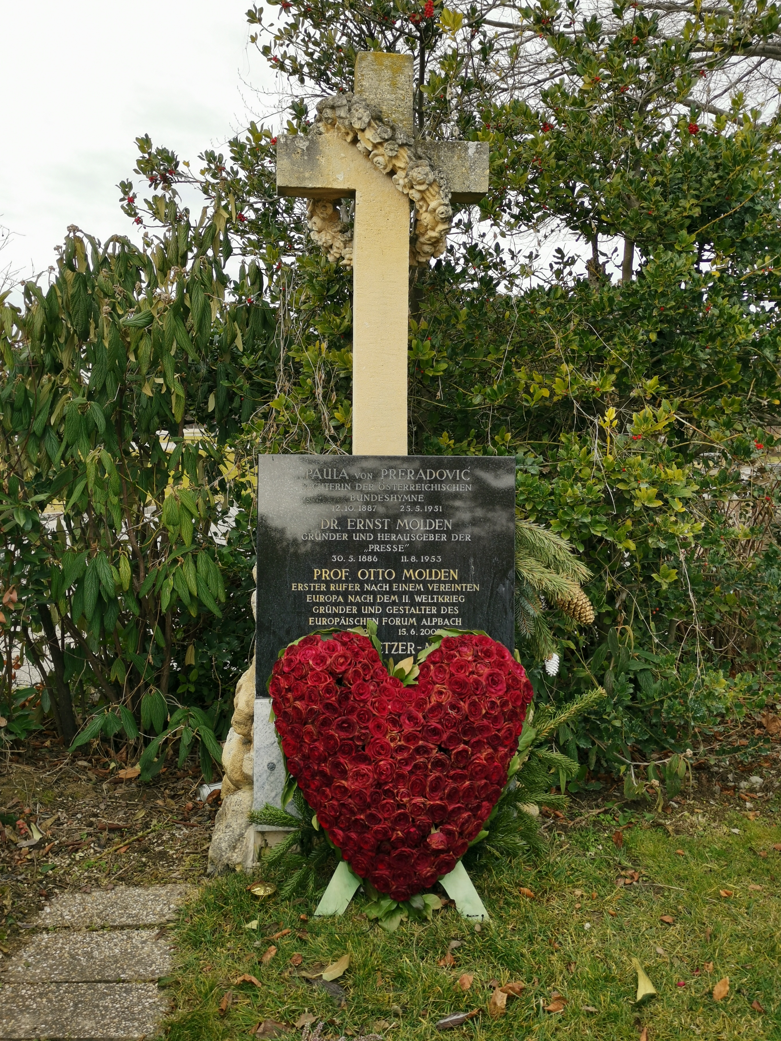 Grab von Paula Preradović sowie Ernst Molden, Fritz Molden und Otto Molden auf dem Wiener Zentralfriedhof